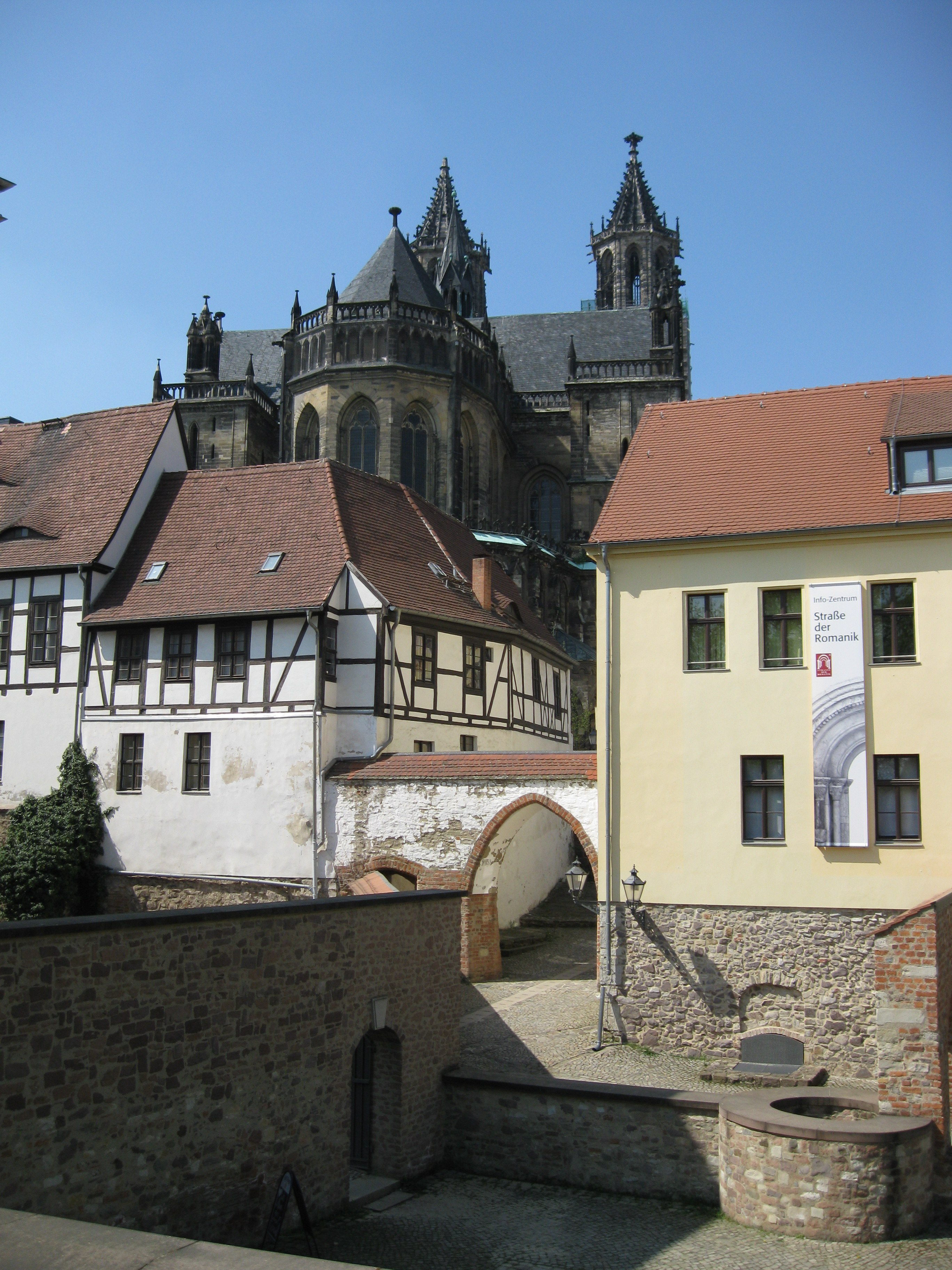 das letzte erhaltene Stadttor der Stadt am Fürstenwall, im Hintergrund der Magdeburger Dom